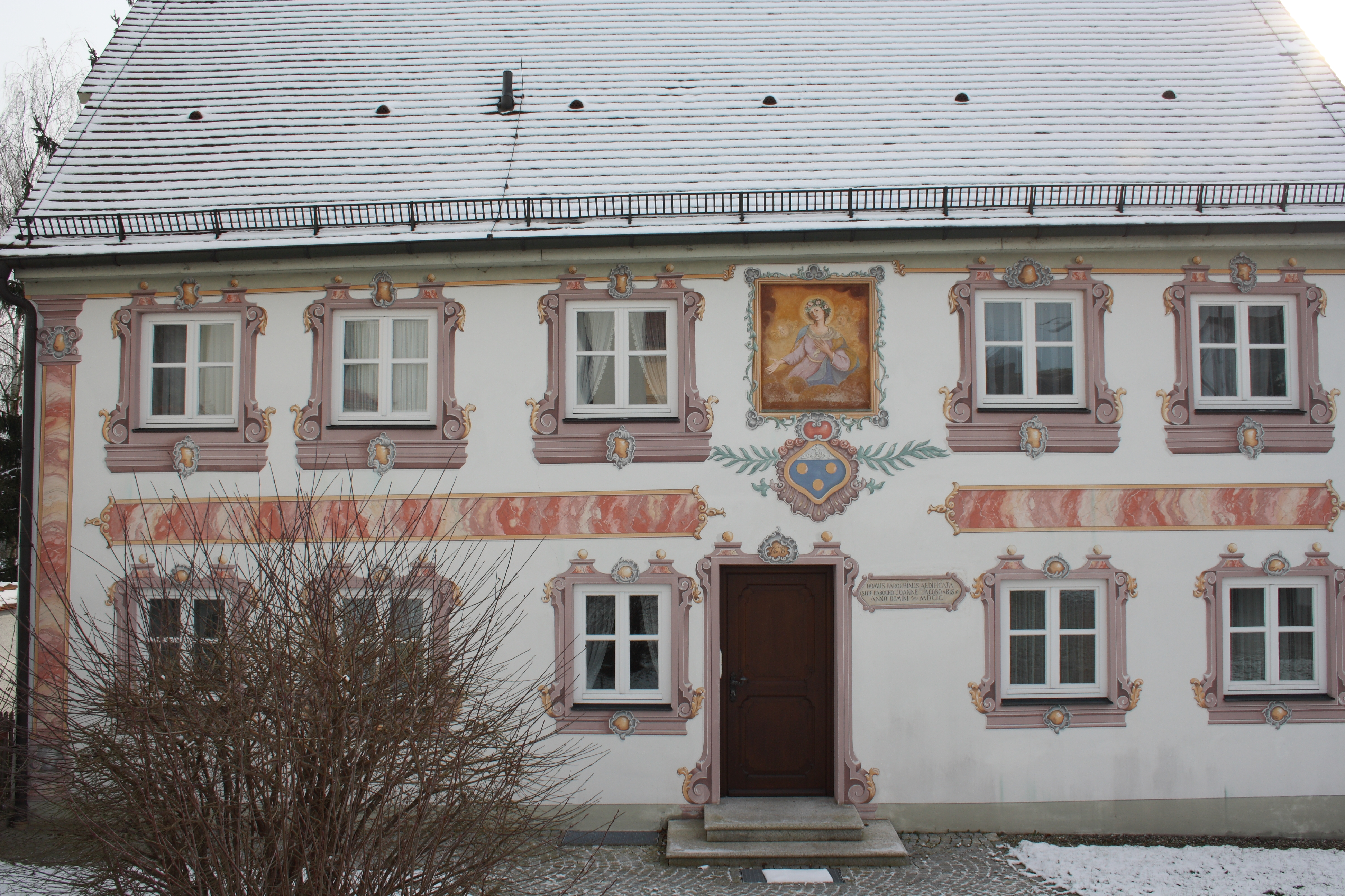 Pfarrhaus in Waldkirch, einem Ortsteil von Winterbach (Schwaben) im Landkreis Günzburg (Bayern), von 1699